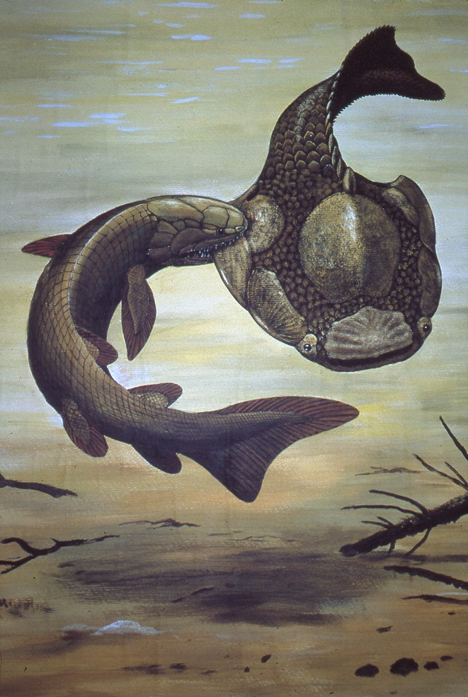 Vihtuimne Laccognathus psammolepist hammustamas.